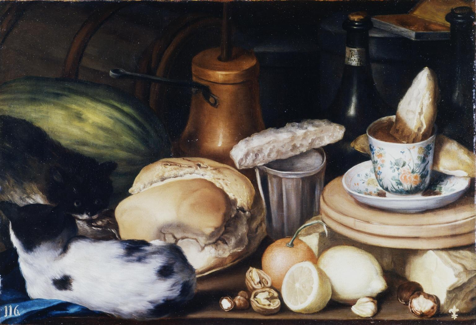 La obra representa un bodegón dieciochesco de merienda.